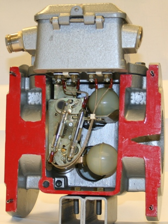 Een doorgezaagde Buchholz relais laat duidelijk de beide vlotters en de Reed-contacten zien